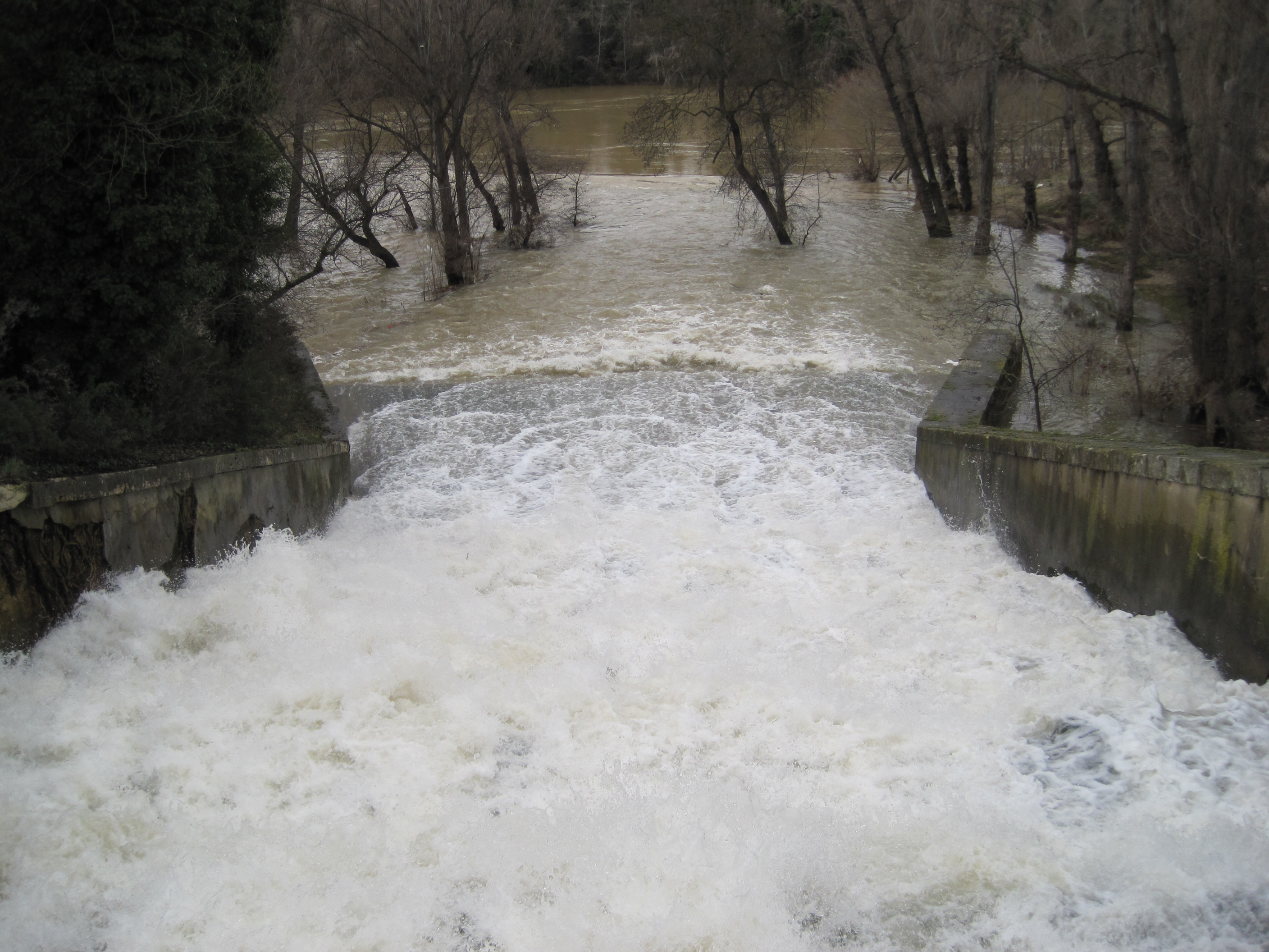 Vista de la desembocadura del río Esgueva, Valladolid (España).